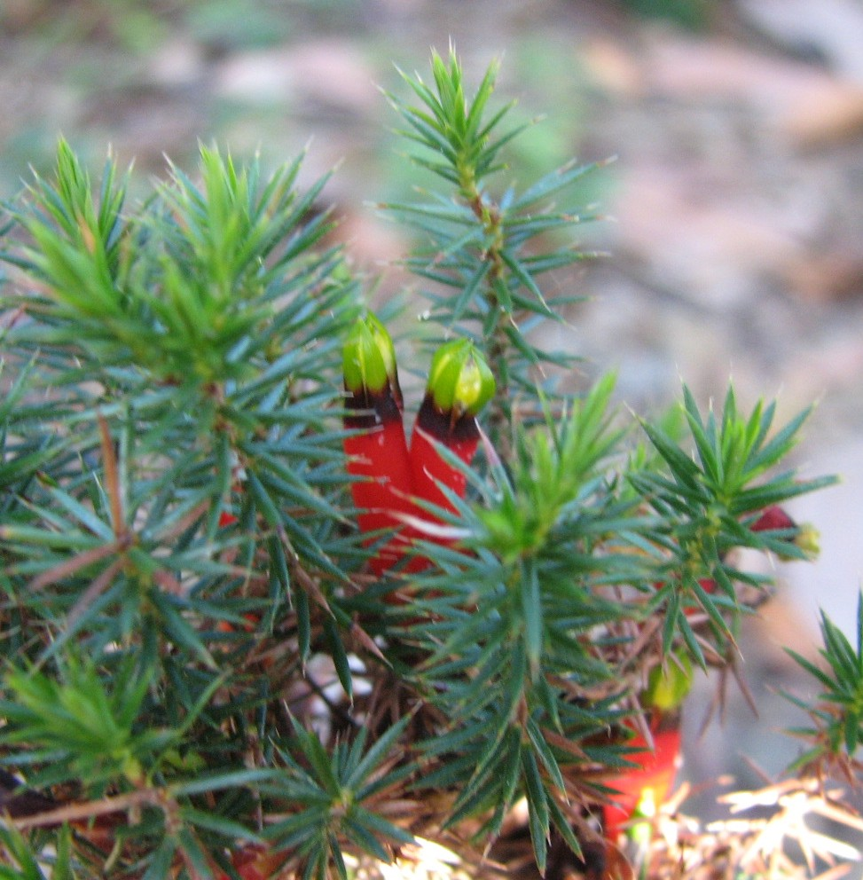 Astroloma foliosum, Maranoa Gardens, Balwyn, Victoria, Australia